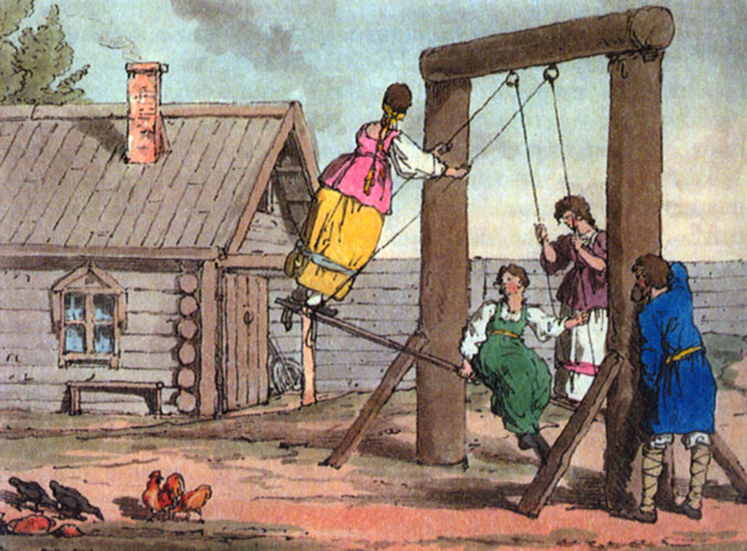 «Дж. А. Аткинсон. Качели. 1800-е»label QS:Lru,"Дж. А. Аткинсон. Качели. 1800-е"